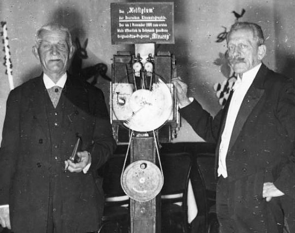 Zentralbild Max Skladanowsky, Filmtechniker geb. 30.4.1863 in Berlin gest. 30.11.1939 in Berlin konstruierte 1892 eine Filmaufnahmekamera sowie einen Filmvorführungsapparat mit dem er am 1.11.1895 im Berliner Wintergarten die erste Filmvorführung gab. UBz: Max Skladanowsky (rechts) mit seinem ersten Filmprojektor "Bioskop". Links sein Bruder Eugen, der sein erster Darsteller in den von ihm gedrehten Kurzfilmen war.